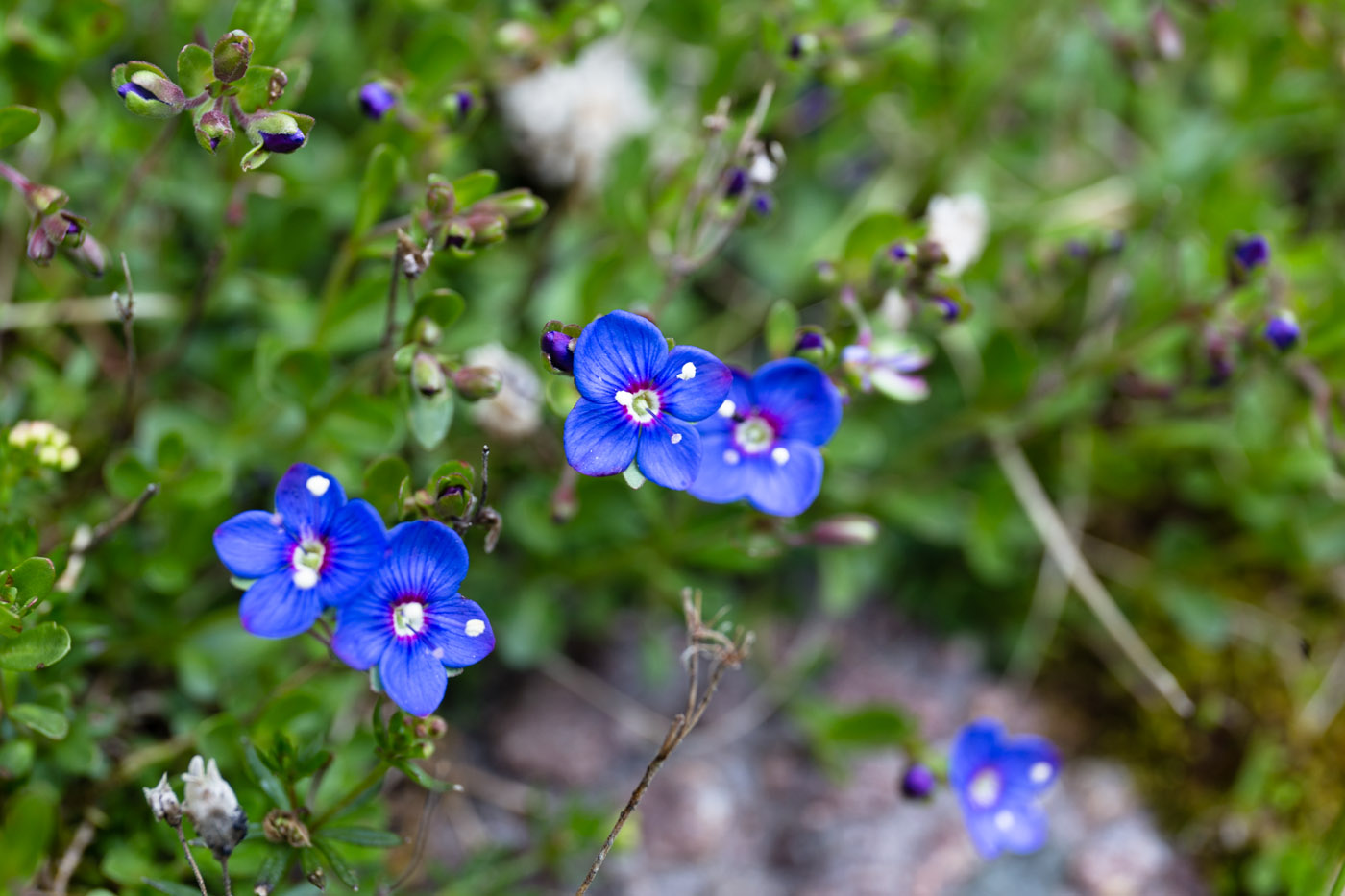 Veronica fruticans - Klippveronika-5566